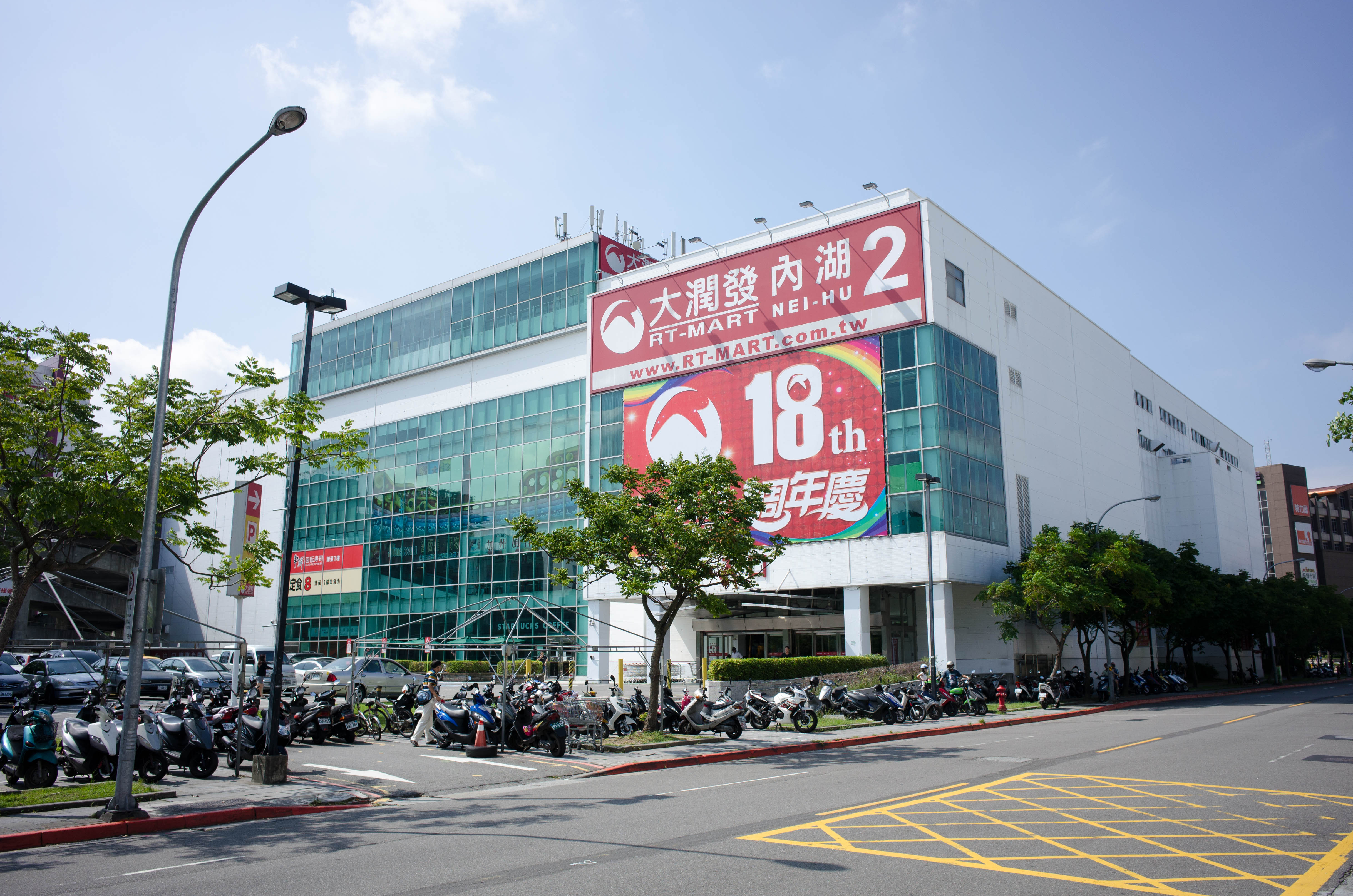 中文（台灣）: 大潤發內湖二店，地址：臺北市內湖區舊宗路一段188號。